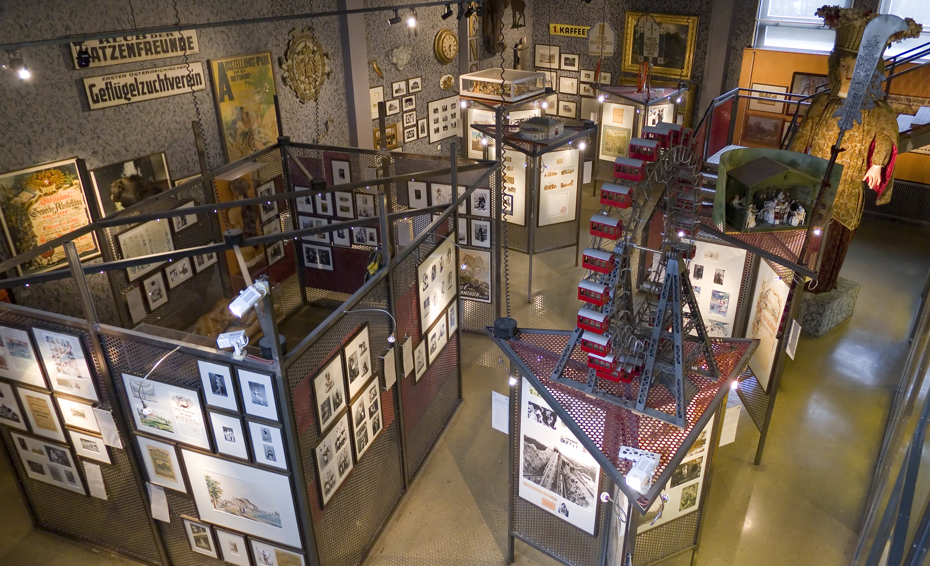 Pratermuseum in Wien 2, Leopoldstadt